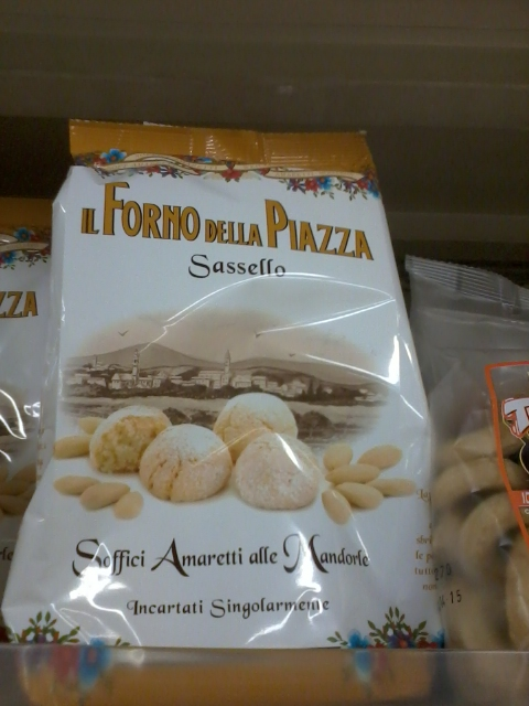 Un paquet de biscuits "amaretti" (macarons) aux amandes (mandorle), produits dans le village italien de Sassello (Ligurie), ici dans un magasin à Lyon.